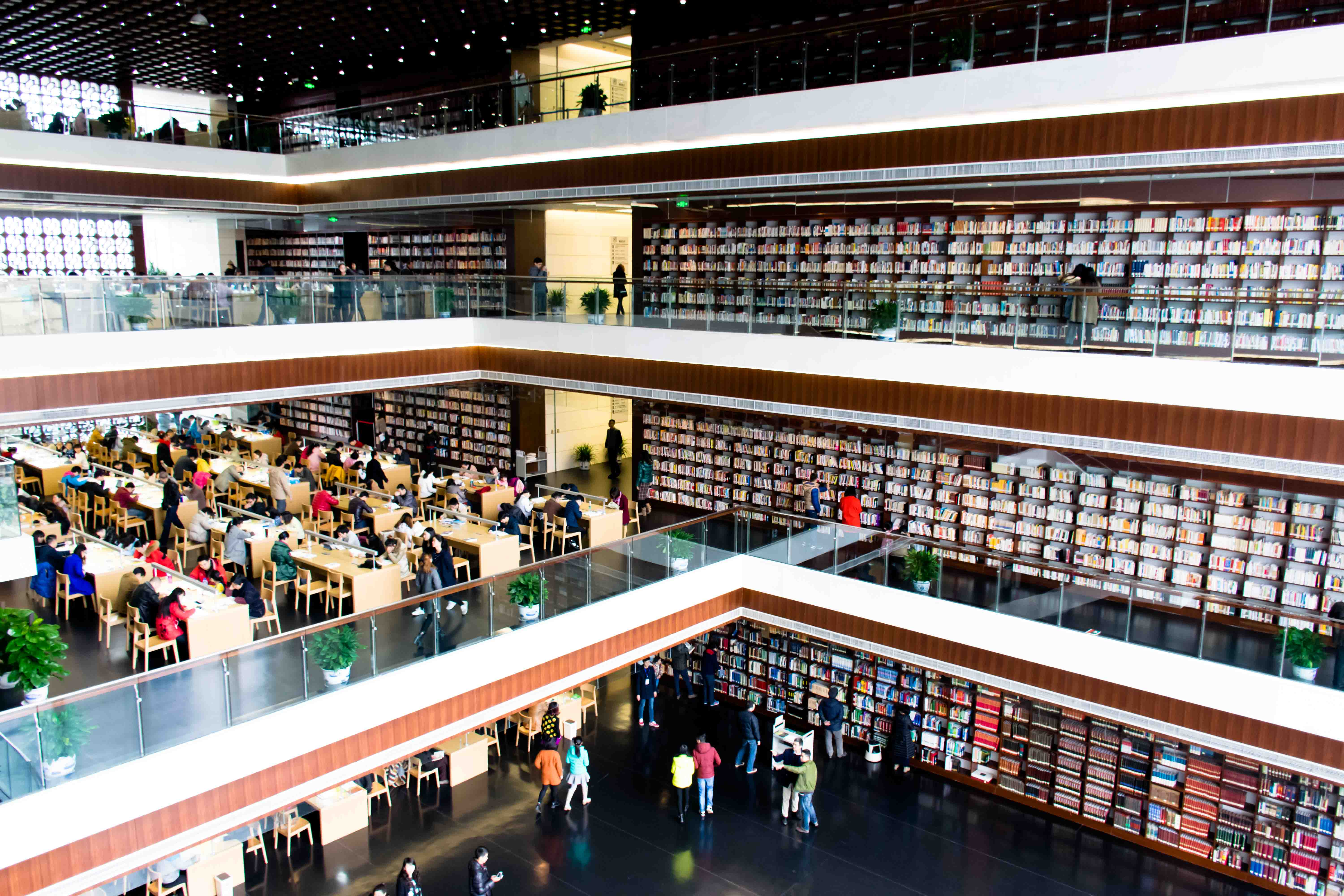 中文（中国大陆）: 四川省图书馆3至6层的星光阅览厅